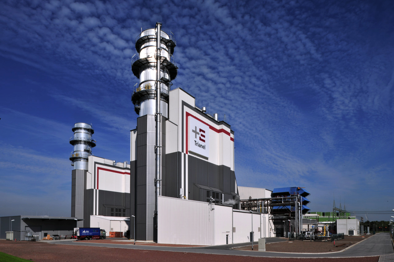 Trianel GuD-Kraftwerk Hamm-Uentrop